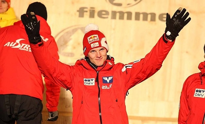 Dekoracja medalowa konkursu drużynowego mężczyzn na skoczni K-120